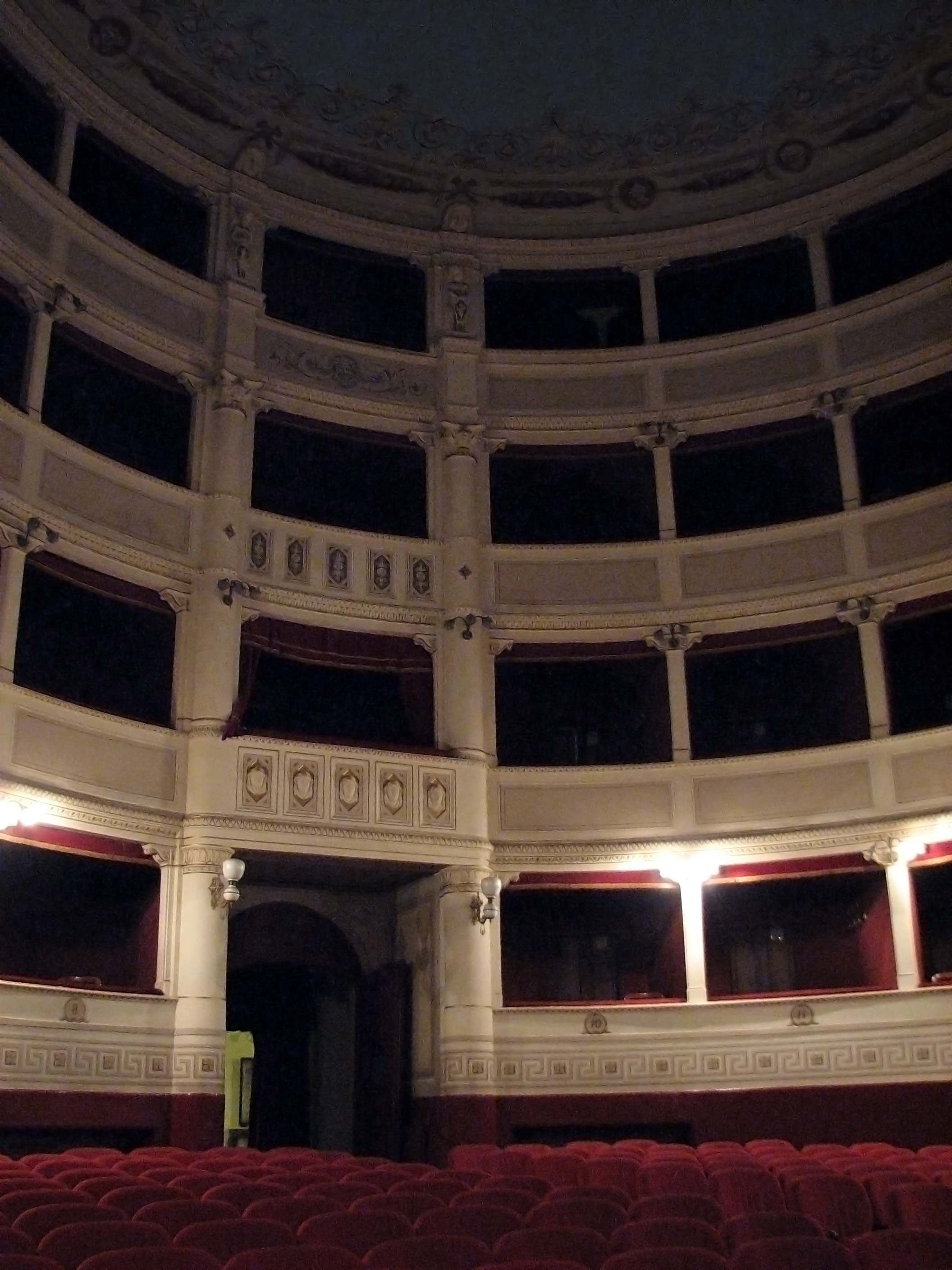 Cortona, Toscana, Italia